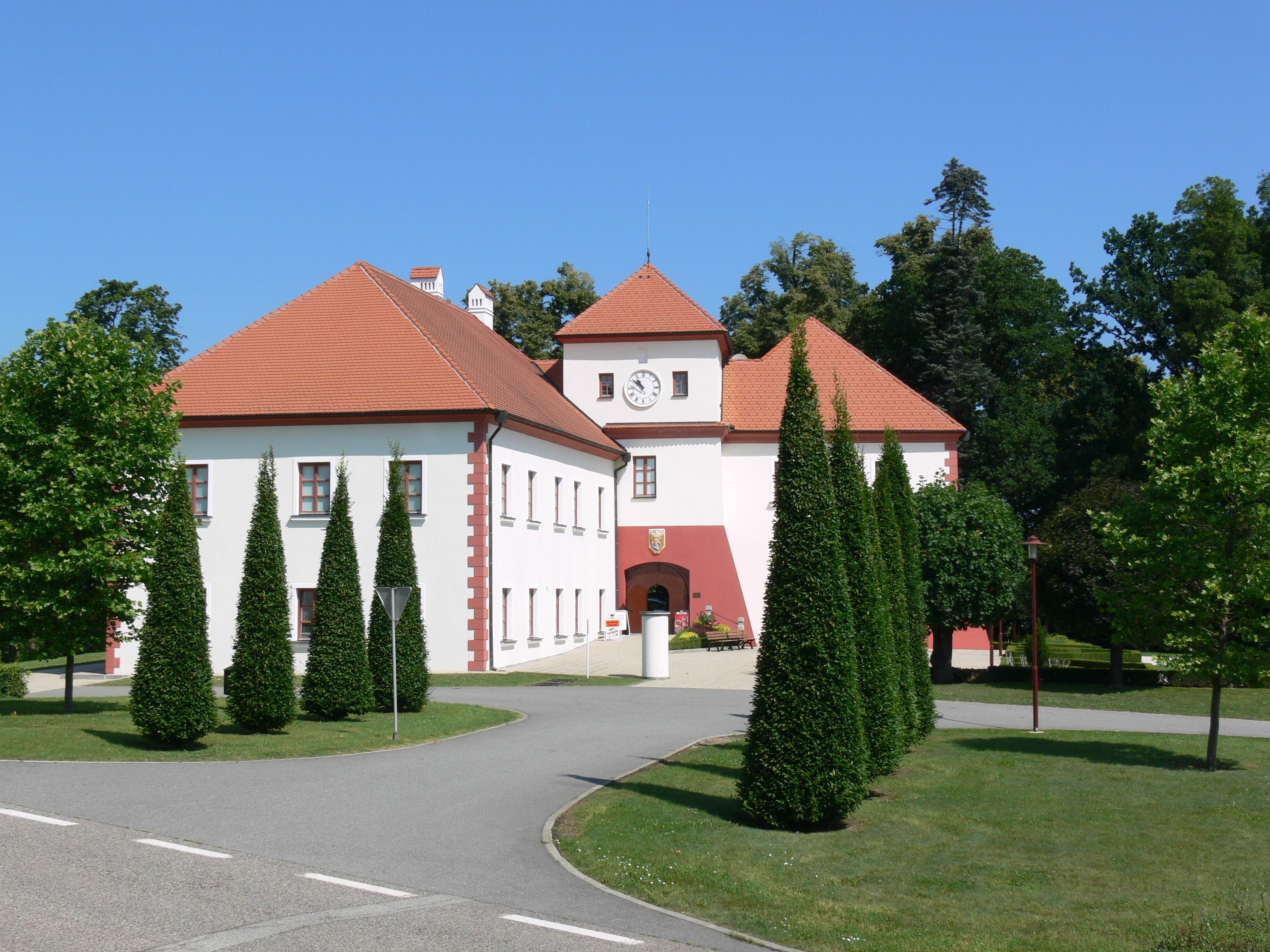 Informační centrum Jaderné elektrárny Temelín